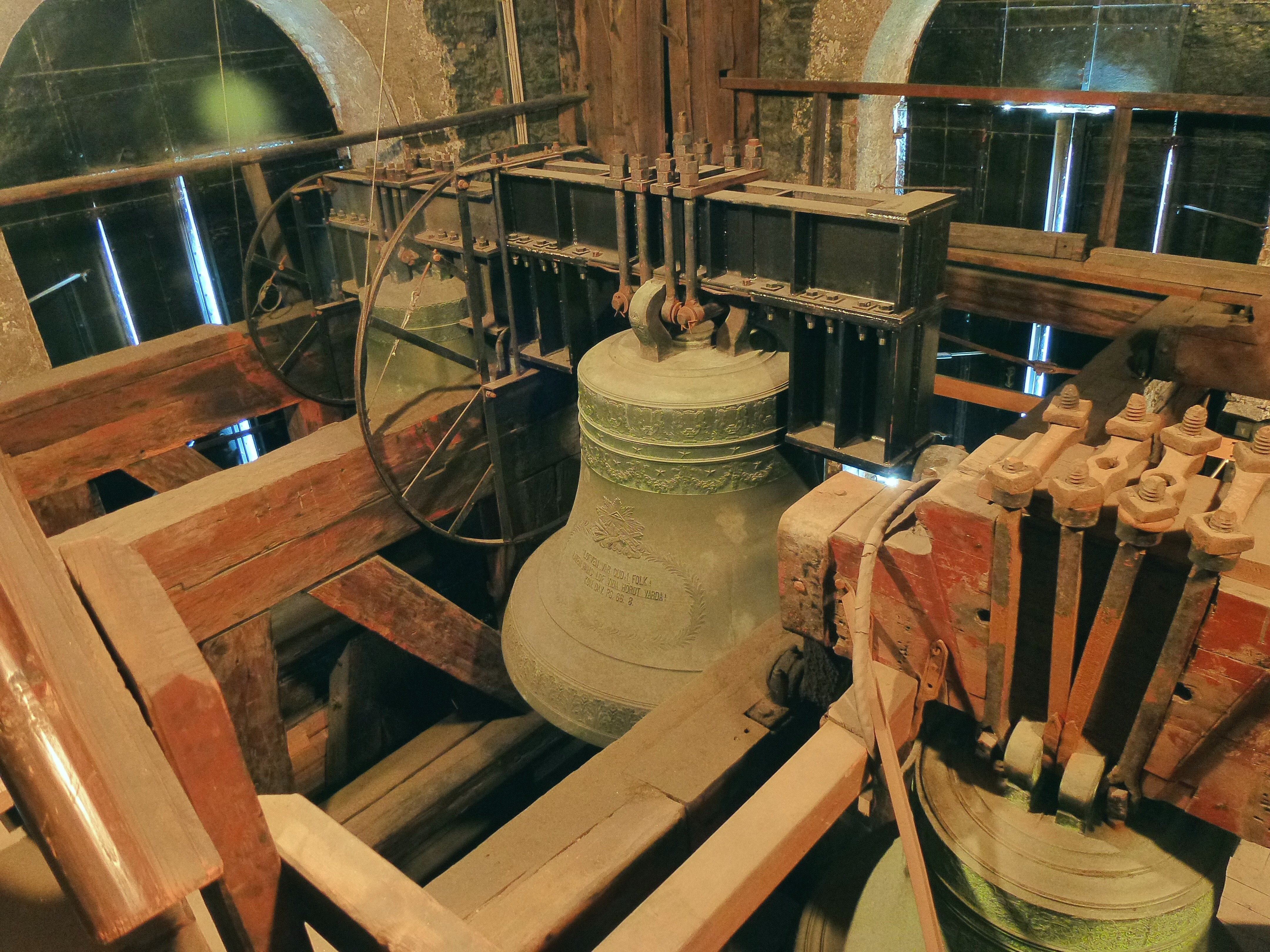 Maria Magdalena kyrka, Stockholm, klockor